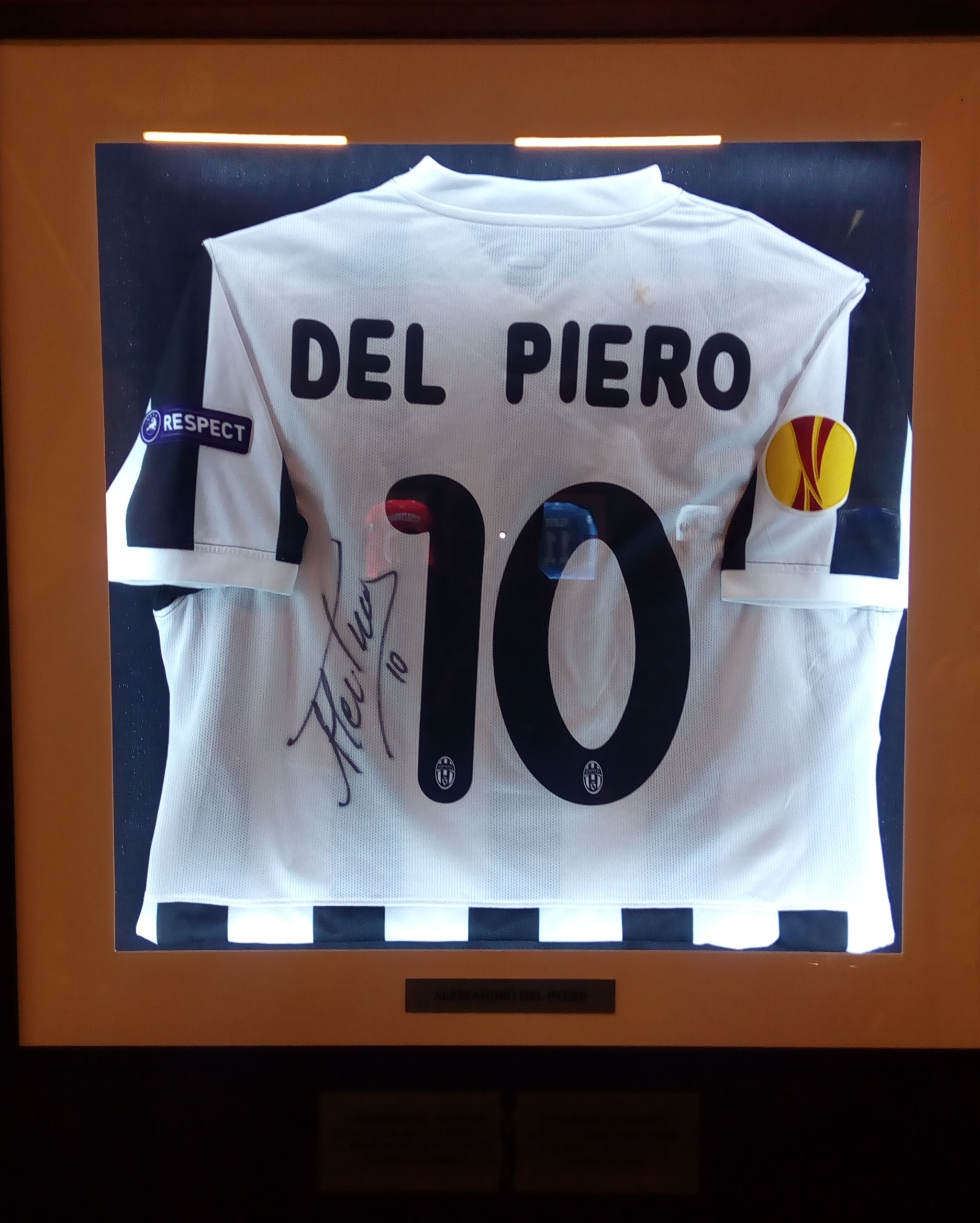 Avropa Liqası Muzeyi Bakıda